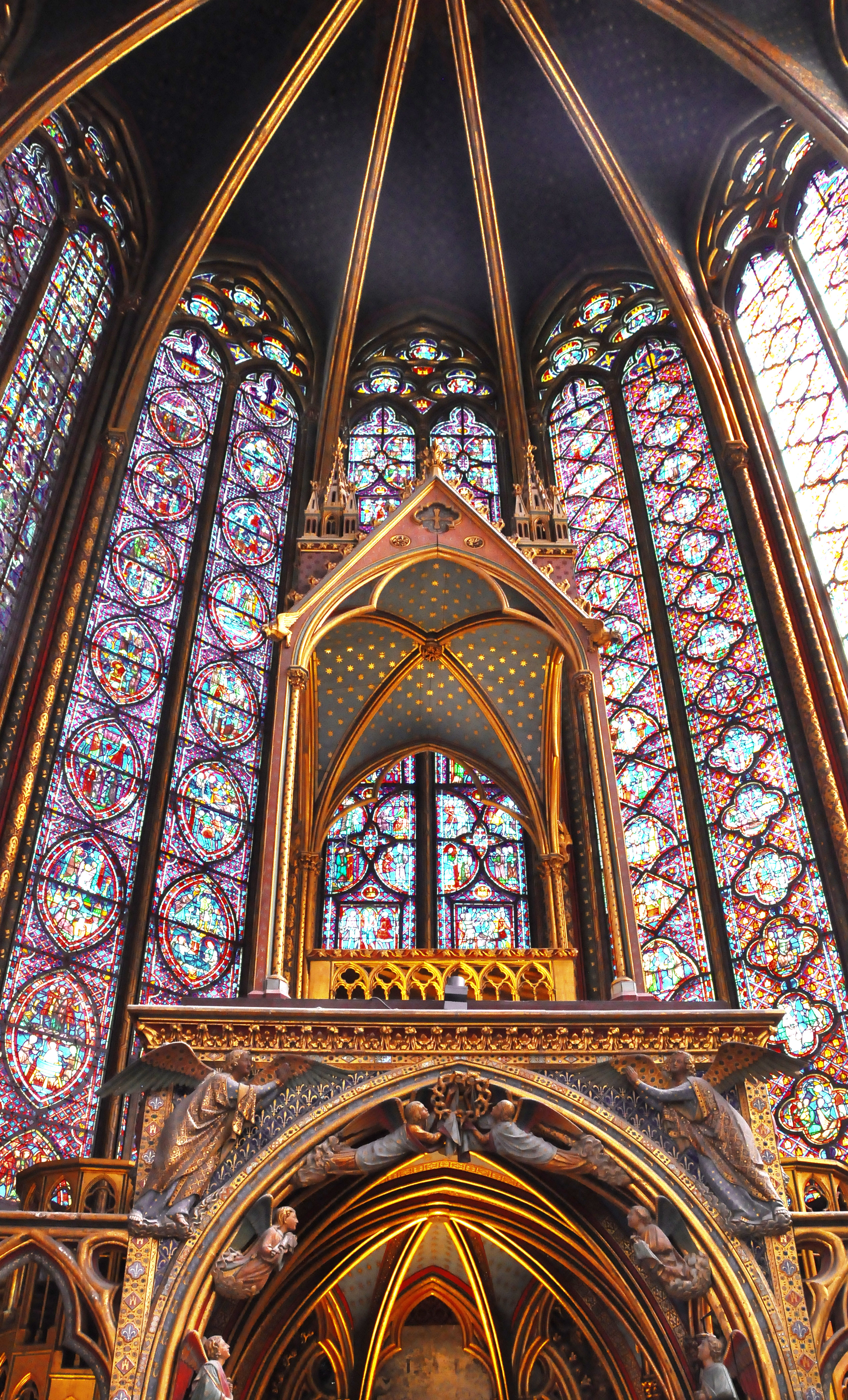 Detail of Sainte-Chapelle located at 1st arrondissement of Paris, France.